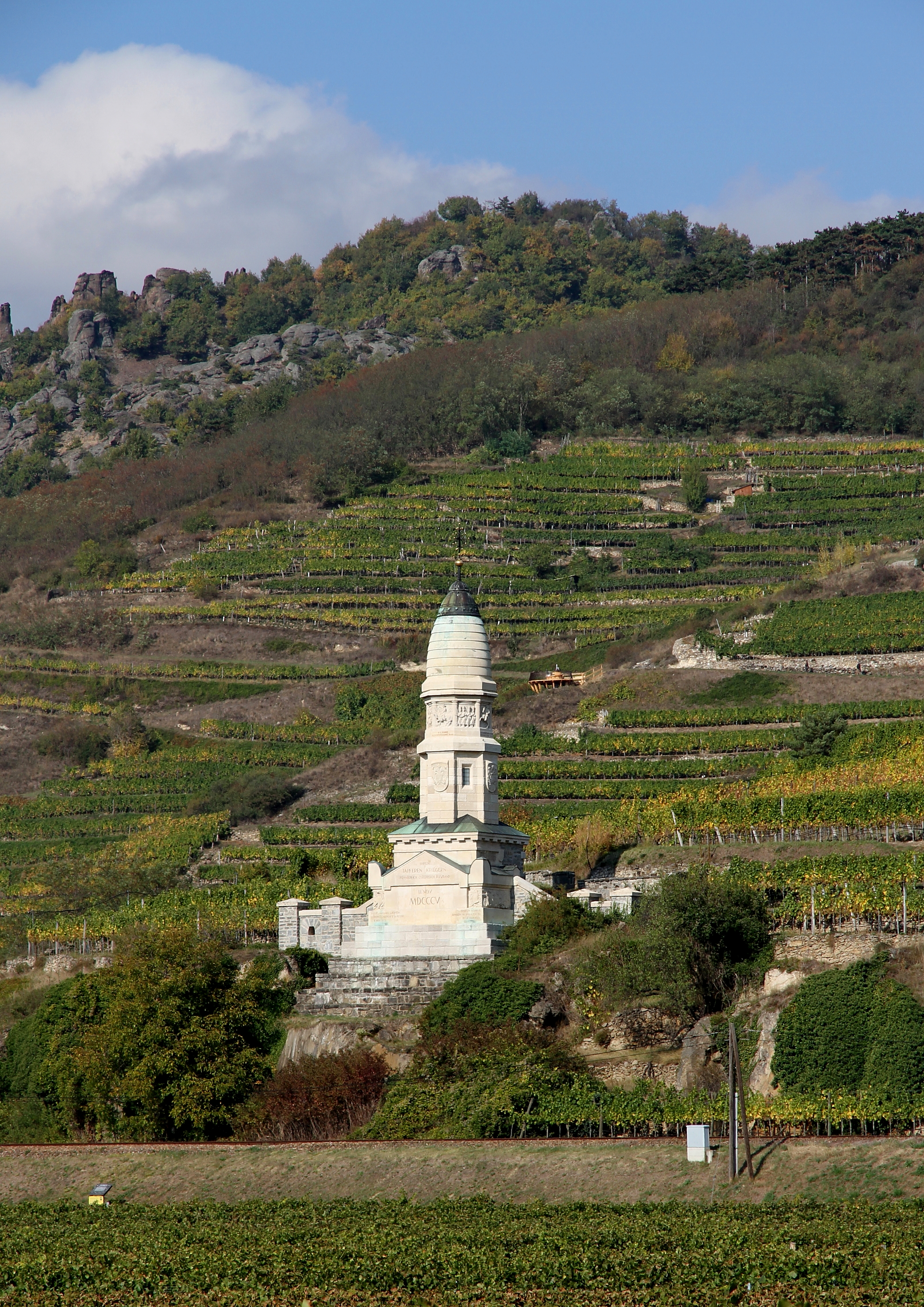 Franzosendenkmal in der niederösterreichischen Stadt Dürnstein. In Gedenken an die Schlacht von Dürnstein am 11. November 1805.